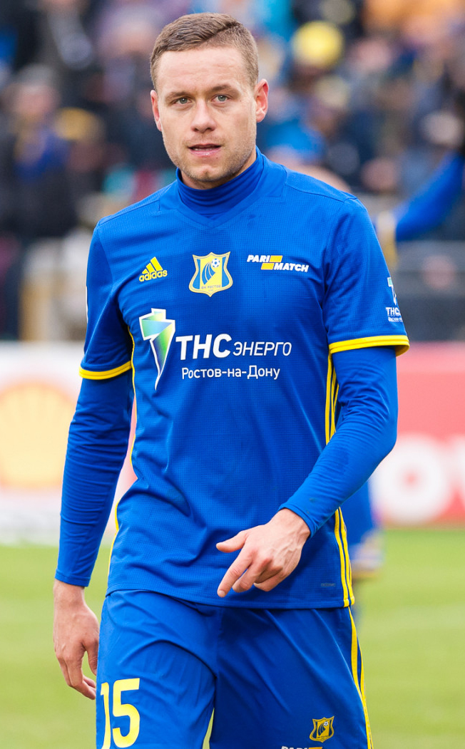 «Зенит» теряет очки и игроков